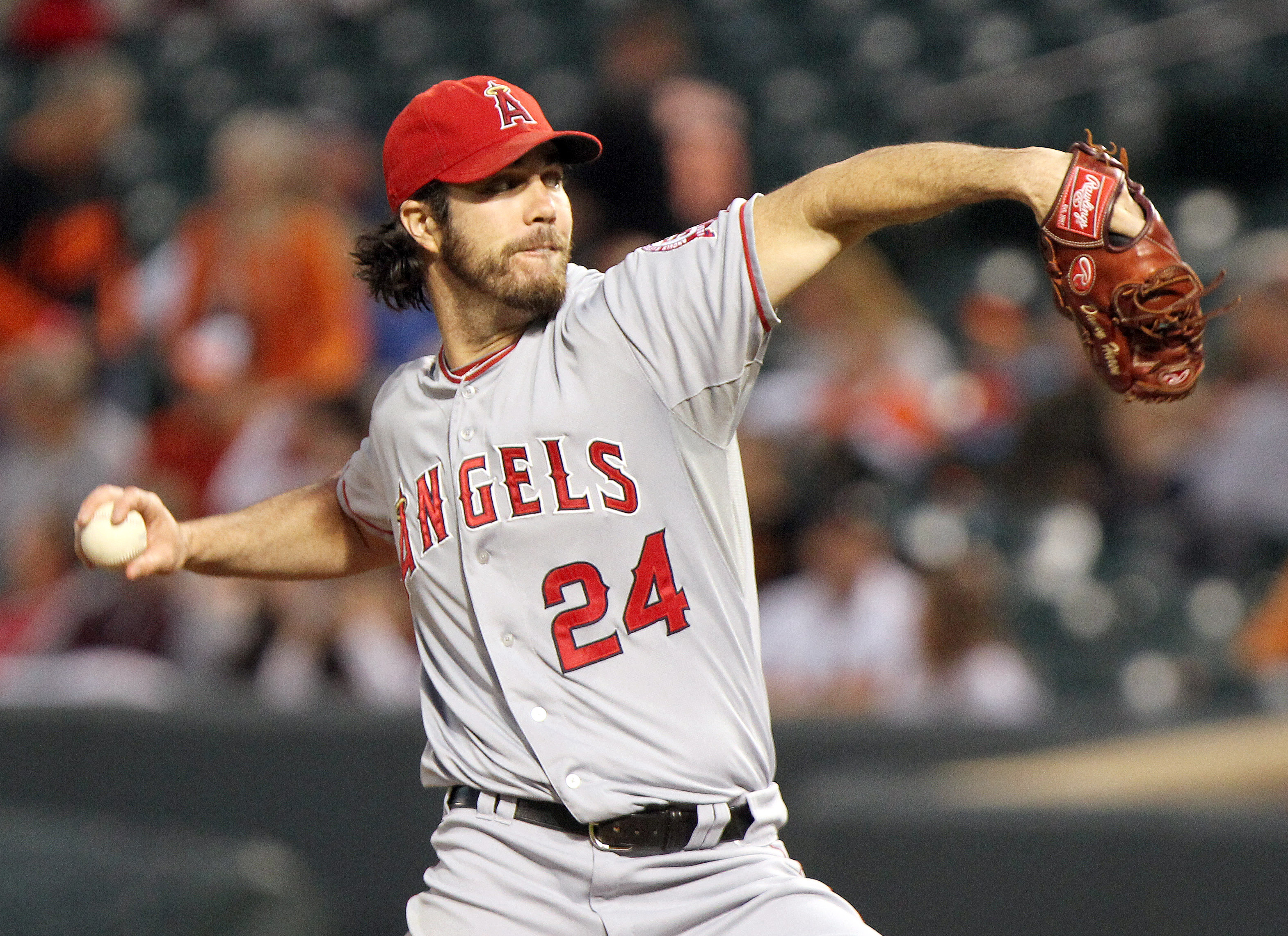 Dan Haren